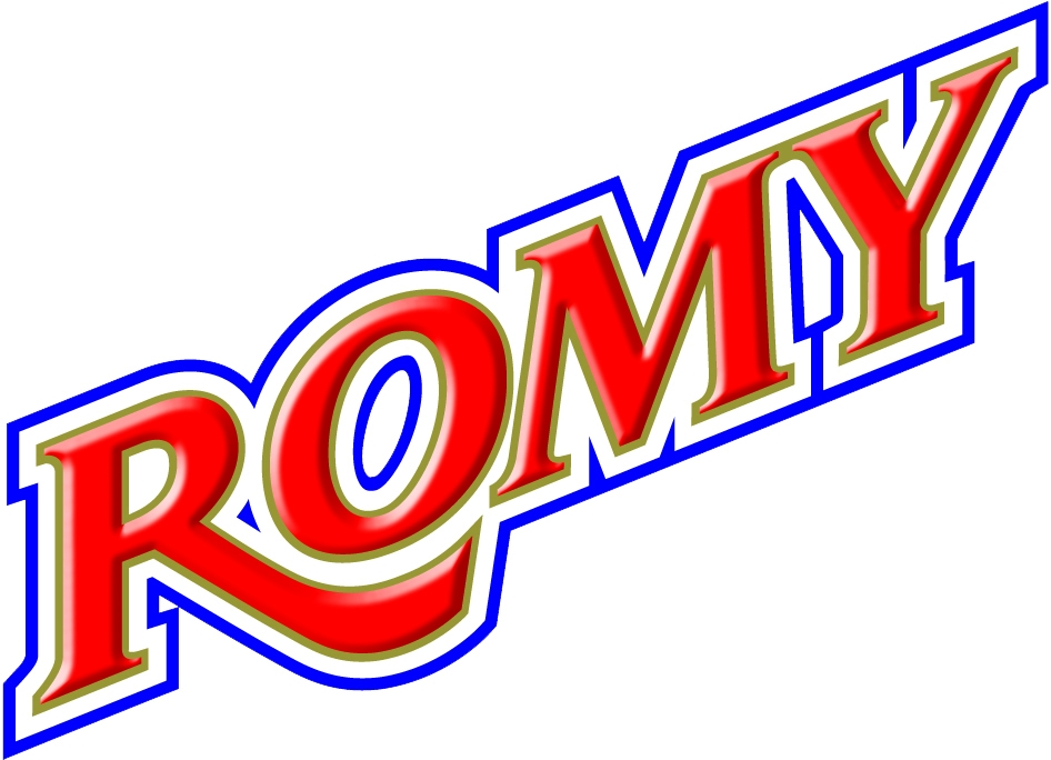 Romy Logo